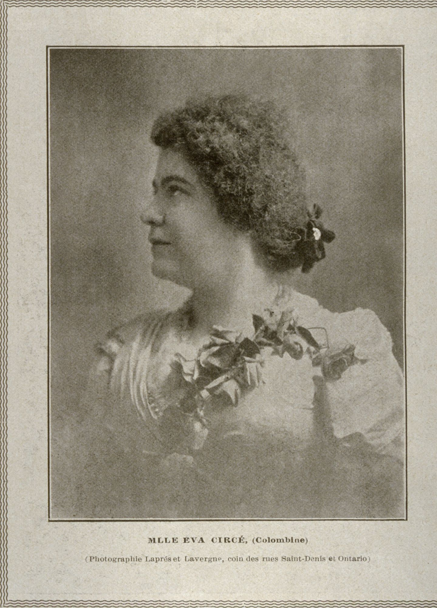 Eva Circé (Colombine). Photographie publiée dans Album universel du 2 mai 1903 (vol. 20 no 53), page 5. [1]